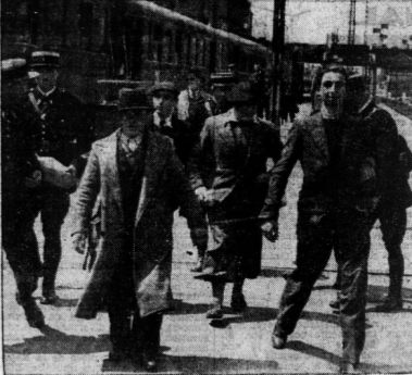 Armand Couère, Jean Gervais, Casteret, et Ange Péresse transférés à la maison d'arrêt de Rennes, suite à leurs implications dans la campagne de "barbouillages" mancée par le PNB